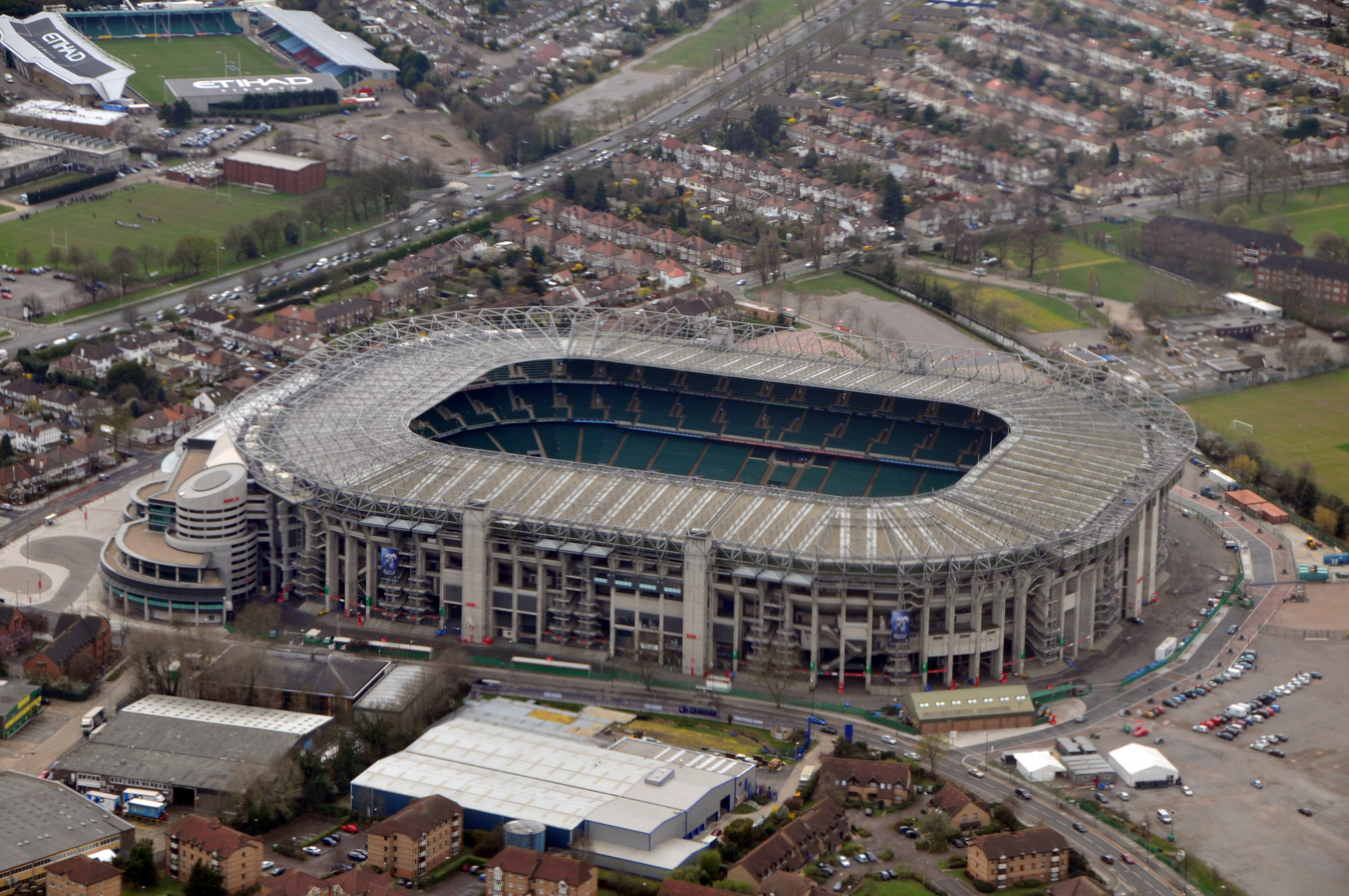 Stade de Twickenham à Londres. Le stade de Twickenham, appelé habituellement Twickenham ou Twickers, est le temple du rugby à XV en Angleterre. Localisée à Twickenham, au sud-ouest de Londres, c'est une arène de 82000 places.